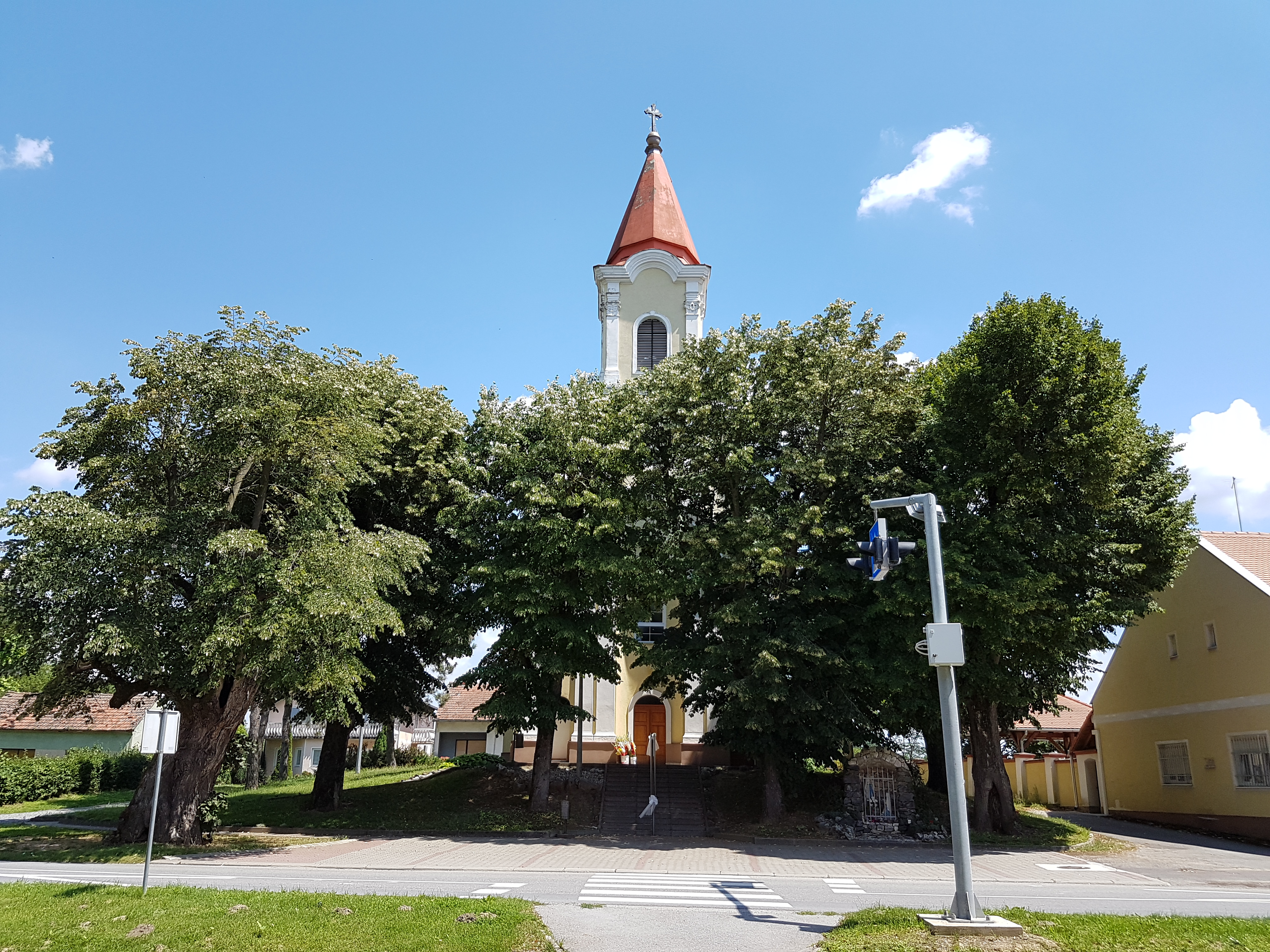 Crkva svetog Ivana Krstitelja u Špišić Bukovici.